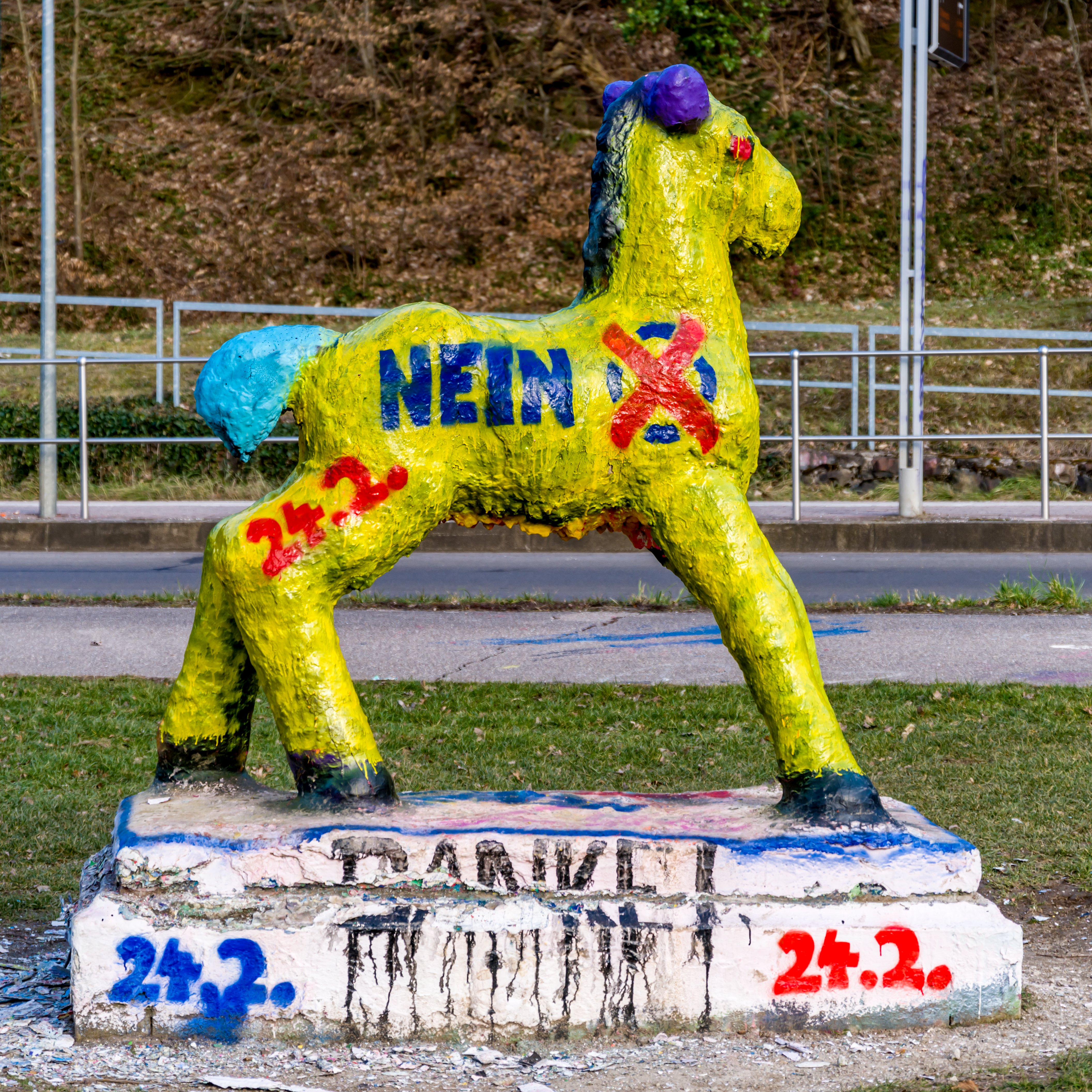 Bilder aus Freiburg im Breisgau Das Holbeinpferdle am 19.02.2019. Am 20.02.2019 geht es für 6 Wochen in die Restaurierung, dabei werden alle Farbschichten entfernt